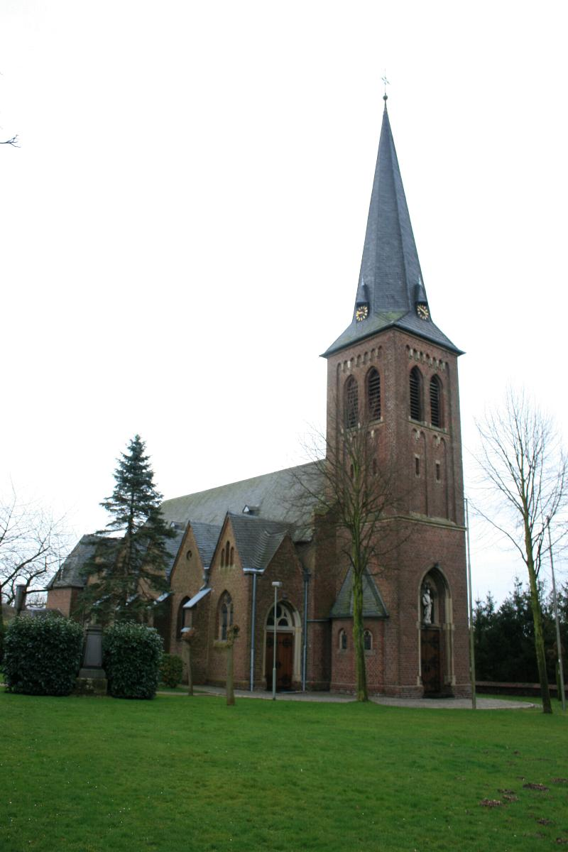 St. Stephan Kleingladbach